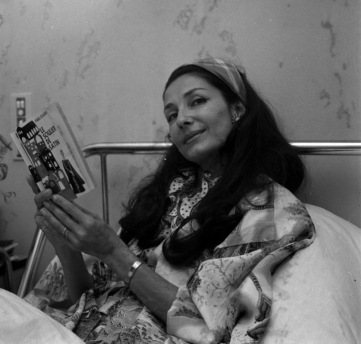 intérieur d'une chambre d'un hôpital Toulousain. Le 9 juillet 1966. Plan rapproché sur la chanteuse Maria Candido, alitée dans une chambre d'hopital suite à une opération. Elle tient dans ses mains un livre ouvert de Paul Claudel "Le soulier de satin". Observation: Soirée grand gala music-hall au Palais des sports (Place dupuy), avec les chanteurs Claude François en vedette, hervé Villard, Michèle Torr, Gaston (meilleur saxophoniste de france) et le groupe les "Gardians".